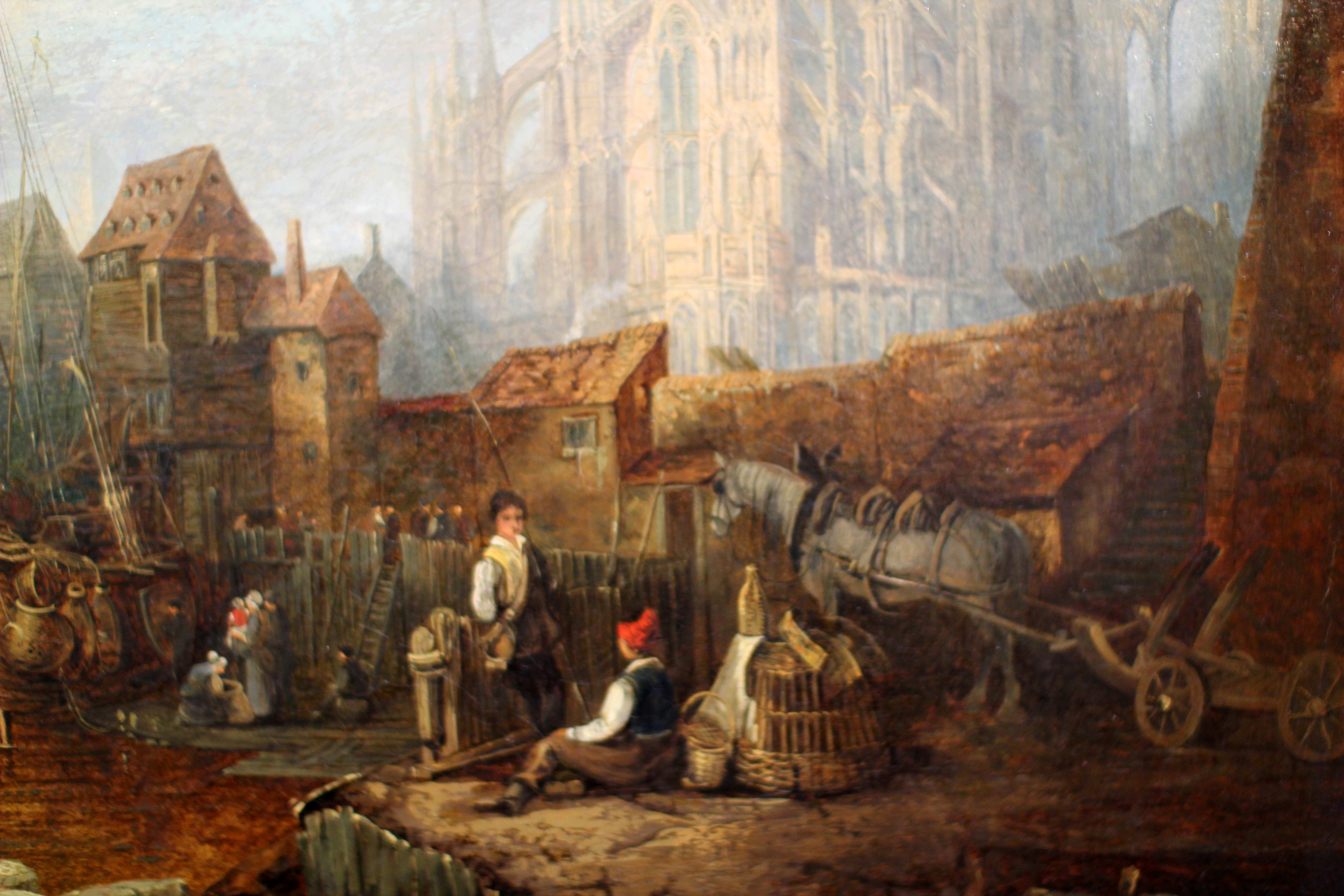 Kölner Rheinufer (Ausschnitt). C. Stanfield, englischer Marine- und Theatermaler, Aufenthalt in Köln 1823, Gemälde ca. 1826. Ständige Ausstellung des Kölner Stadtmuseums, ähnliches Bild in Bonn, Rhein, Landesmuseum